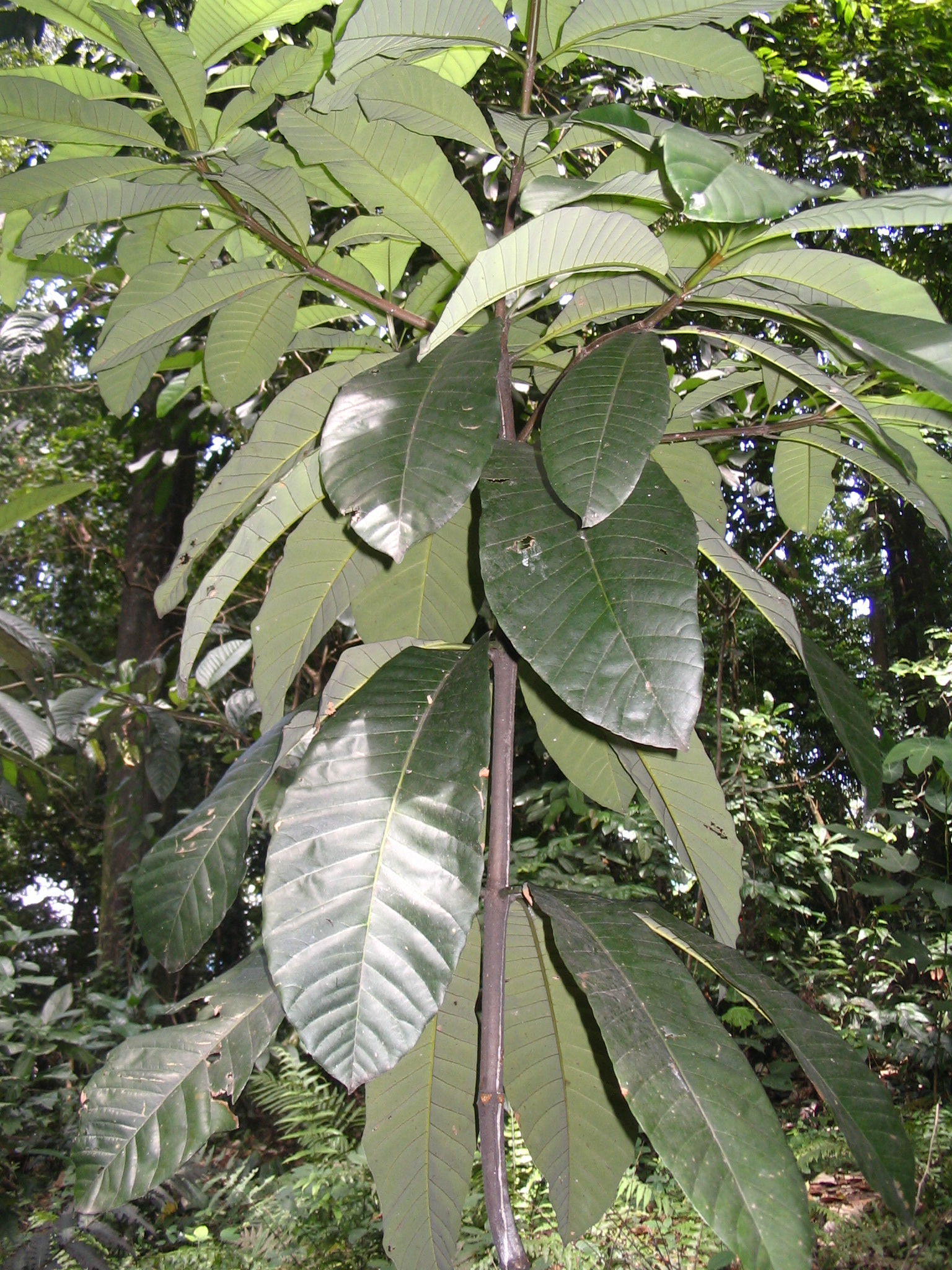 Dyera costulata - feuilles ( Bukit Nanas Forest Reserve - Kuala Lumpur)